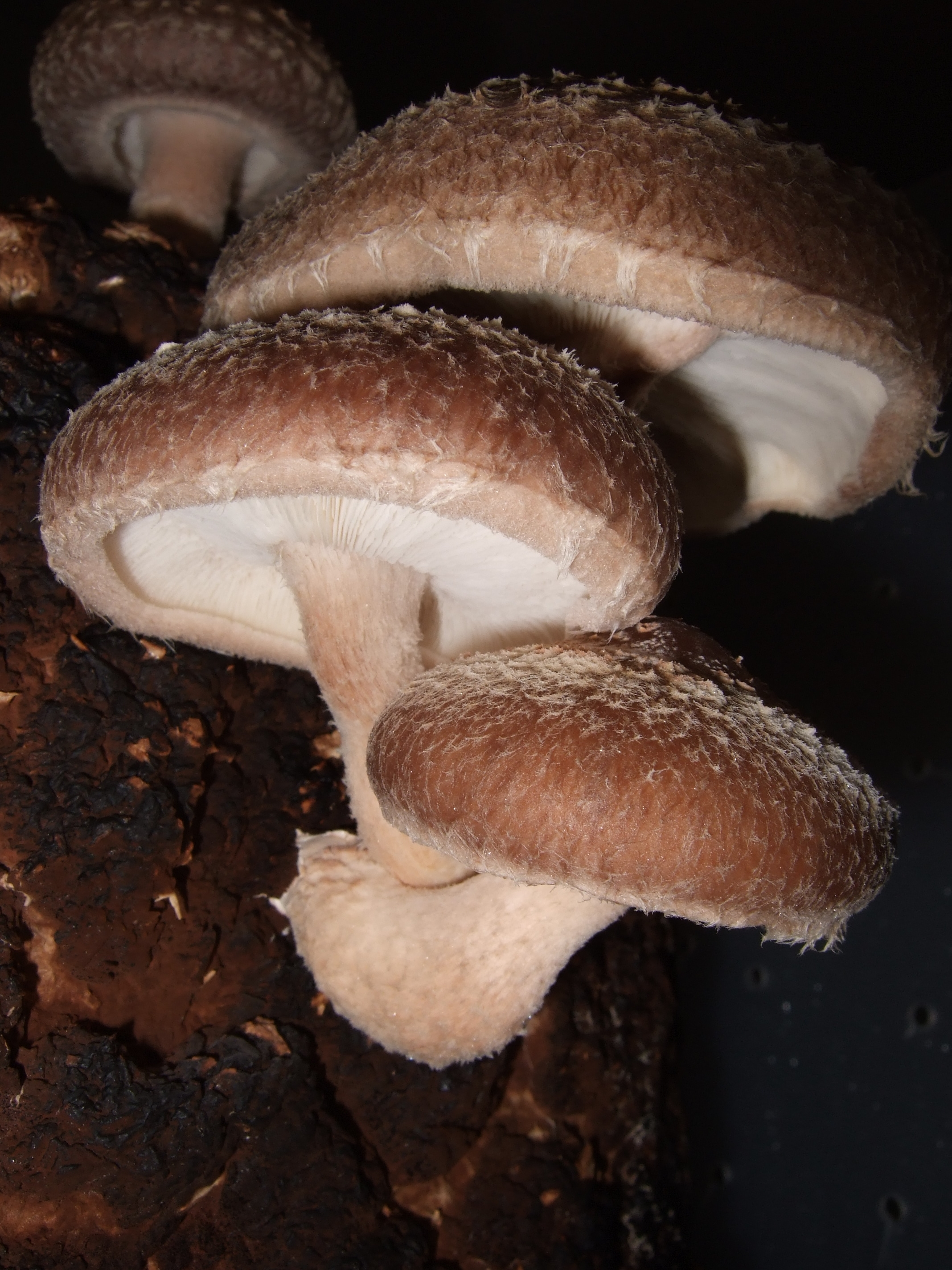 Shiitake mushroom growing on wood.